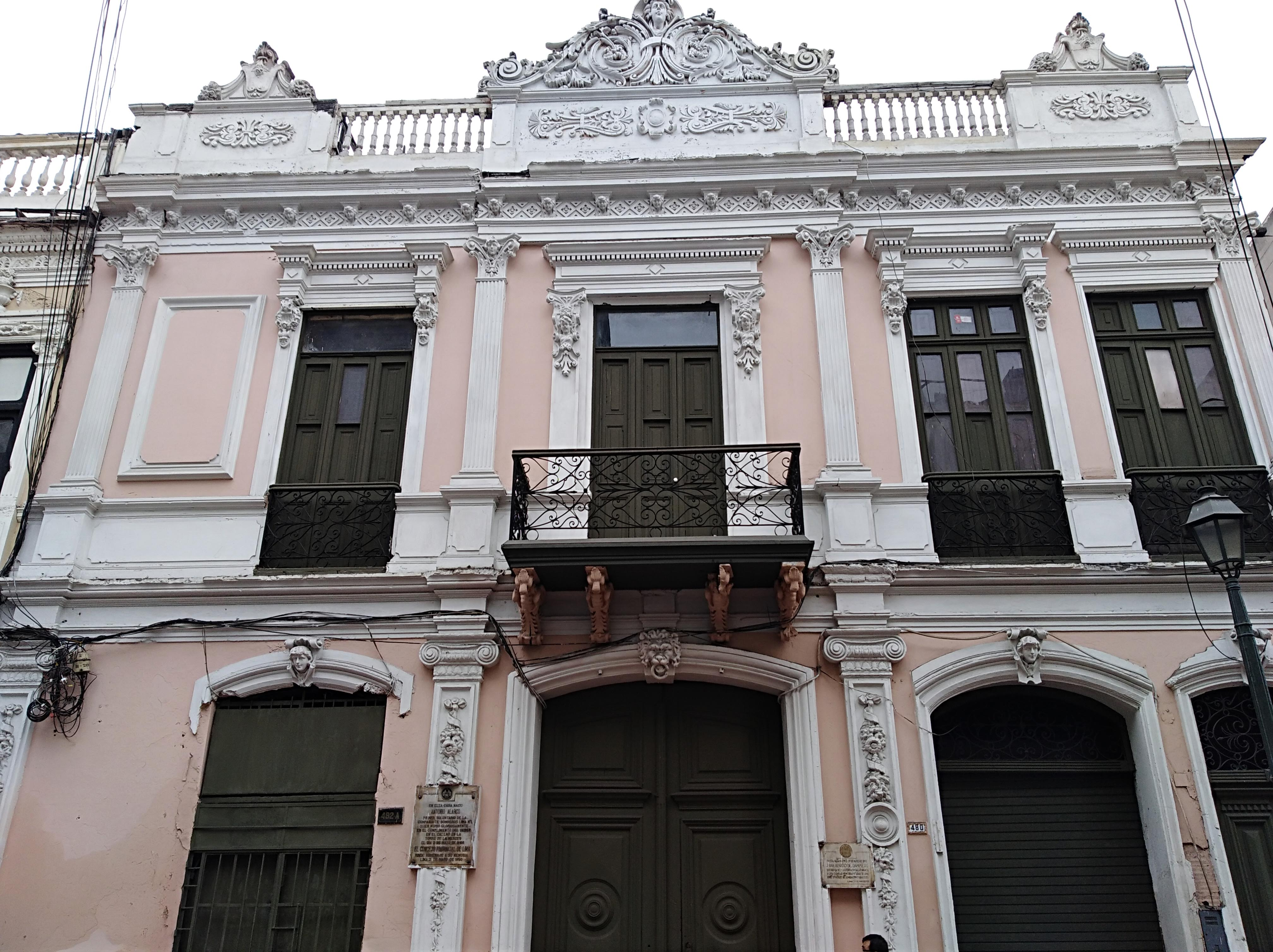 Casa donde nacieron Juana Alarco y Antonio Alarco